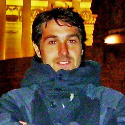 Futbolista argentino.